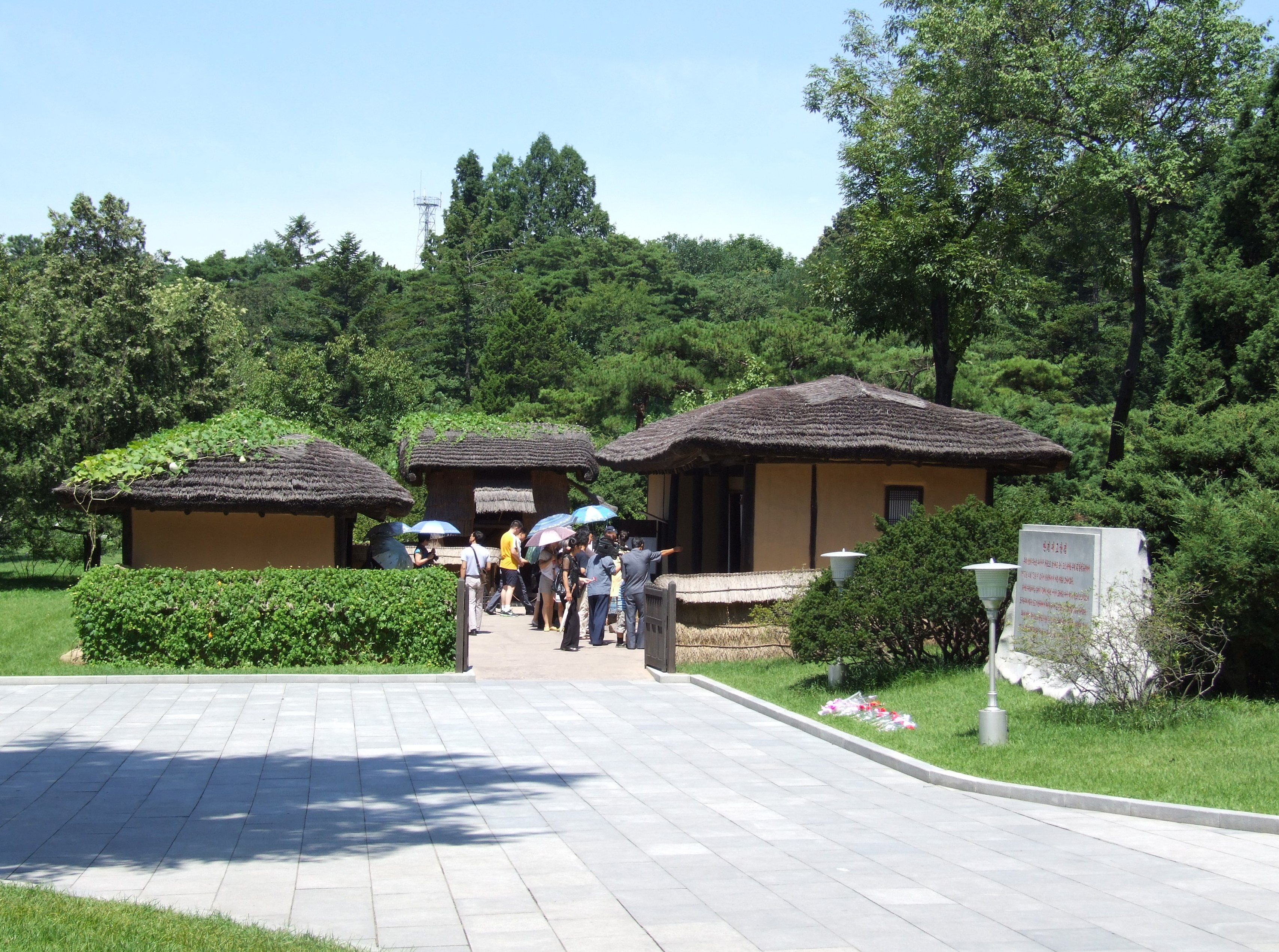 Geburtsort von Kim Il-sung